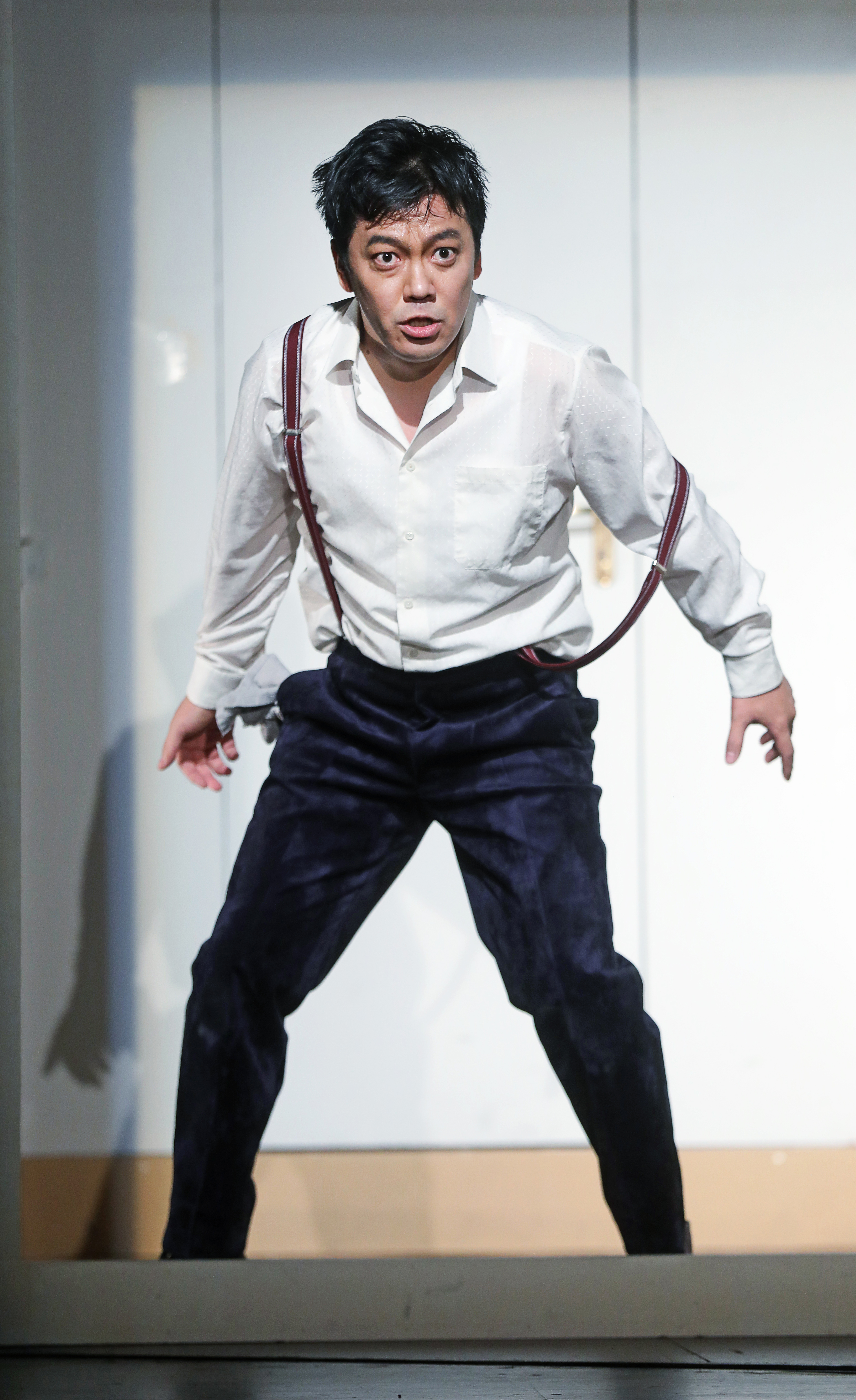 Le nozze di Figaro – Yoshiaki Kimura als Figaro (2019 Theater Bielefeld)